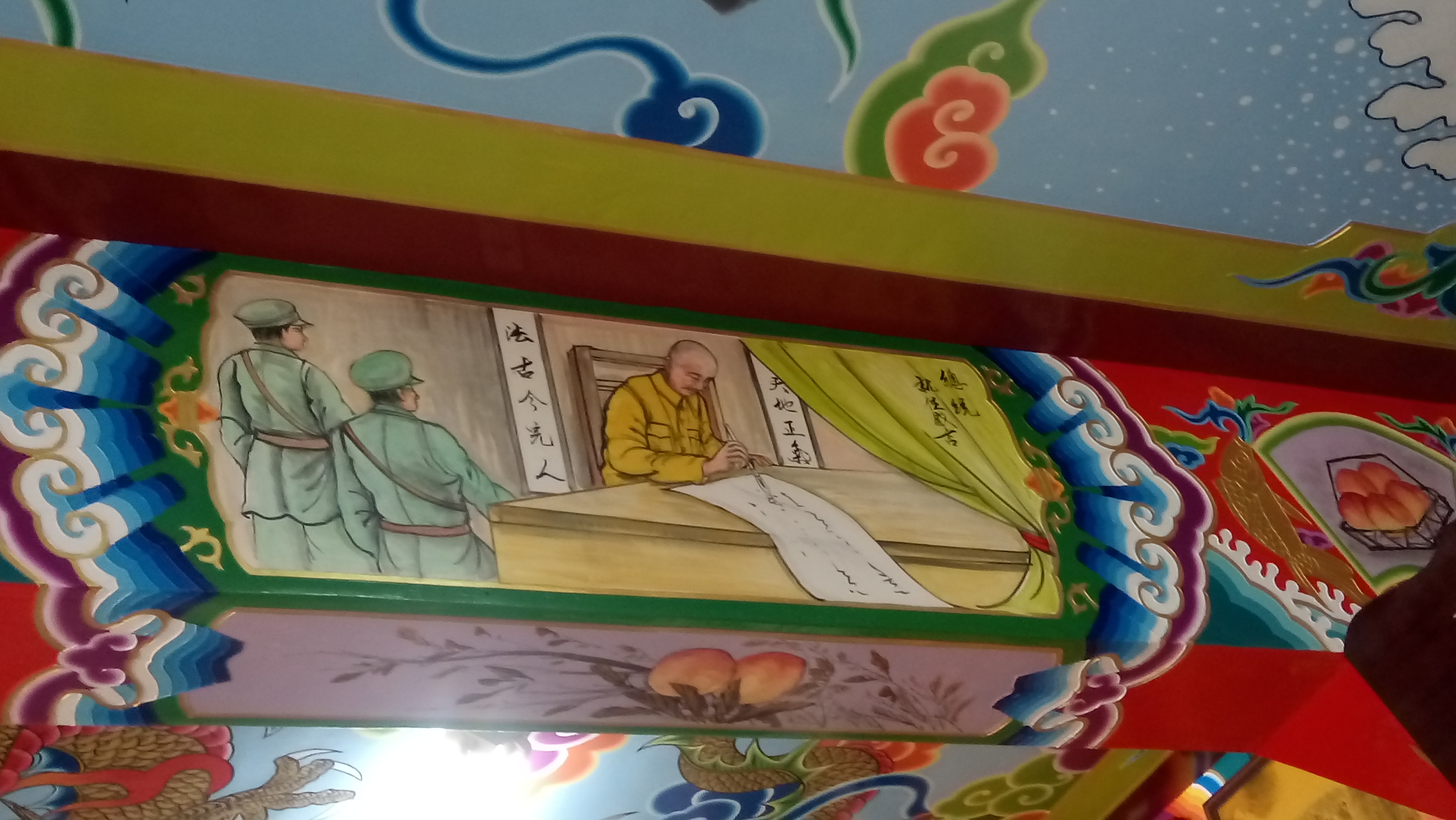 右上:總統就任感言 背景:(養)天地正"義"，法古今完人 此處"義"字應為錯字，此對聯出於菜根譚，第二卷之八。